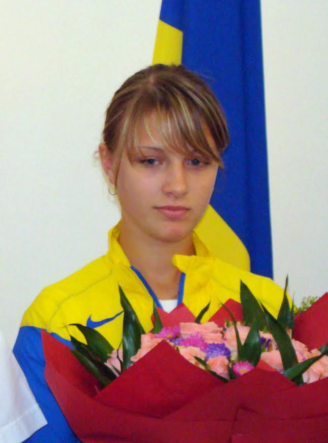 15.08.2008 Пекин. В украинском доме (украинском посольстве)